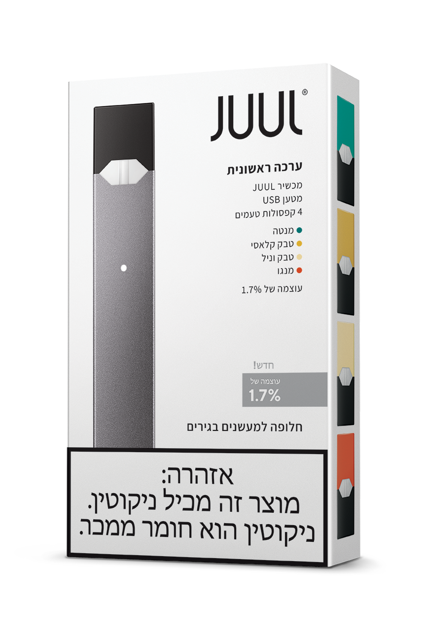 ערכת ג'ול